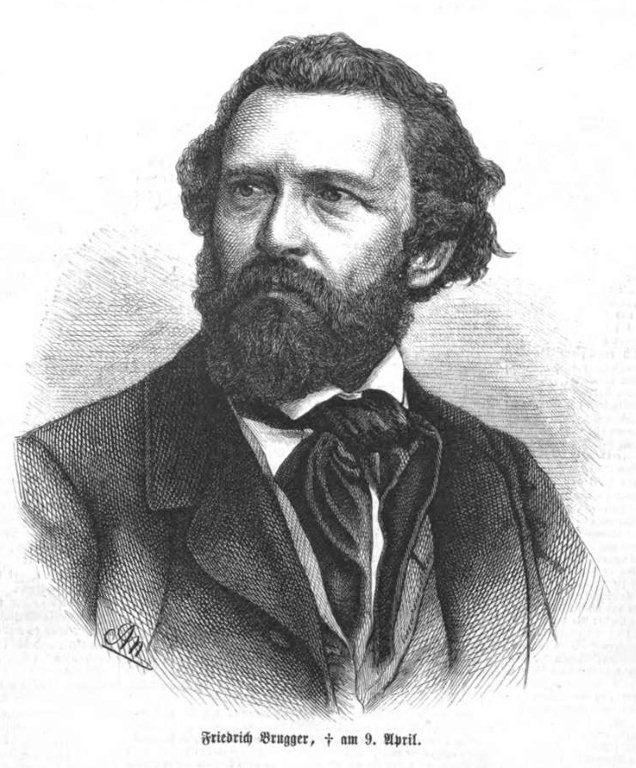 Friedrich Brugger, deutscher Bildhauer im 19. Jh.